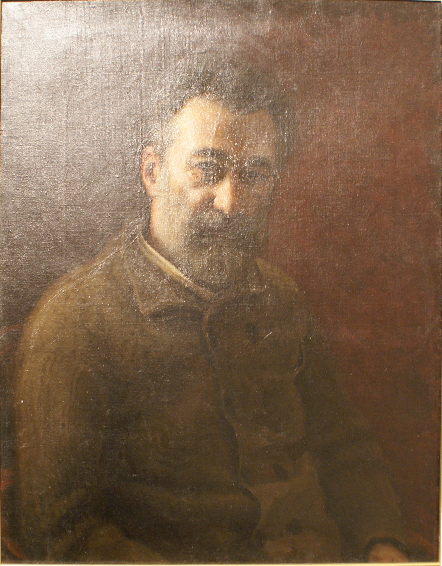 Клод М. П. Аўтапартрэт. Палатно, алей